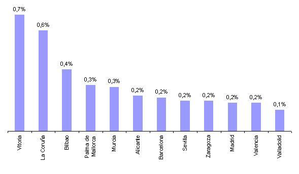 Votos por municipios obtenidos por el partido político Por Un Mundo más Justo (PUM+J) en las Elecciones de Mayo de 2007 en España.